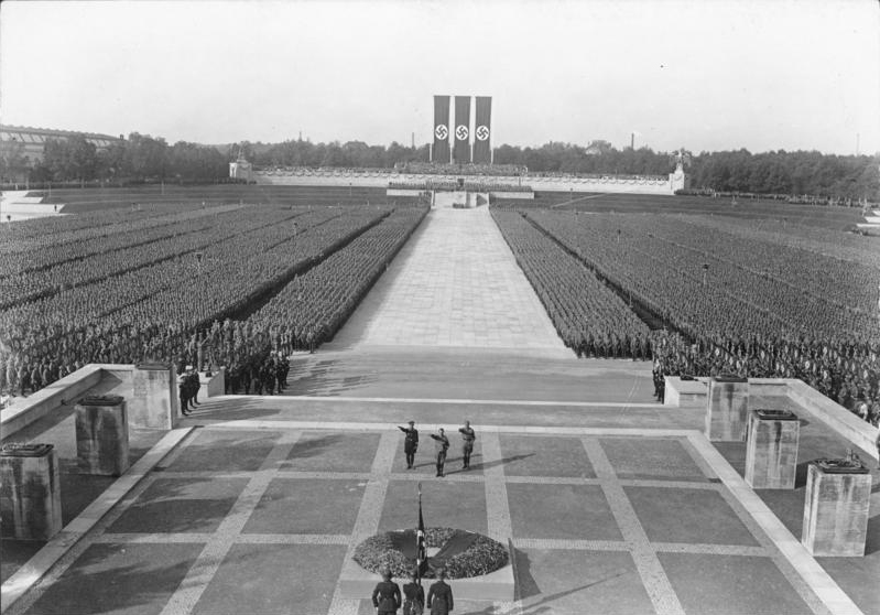 Der Reichsparteitag der N.S.D.A.P. in Nürnberg 1934. Der große Appell der S.A. und S.S. vor dem Führer in der Luitpold Arena in Nürnberg. Blick auf das riesige Feld der S.A. und S.S. während der Heldenehrung. Im Vordergrund der Führer und der Chef des Stabes der S.A. Lutze und Reichführer der S.S. Himmler bei der erhebenden Totenfeier. Ganz im Vordergrund die Blutfahne vom 9. November. Bild 16196.